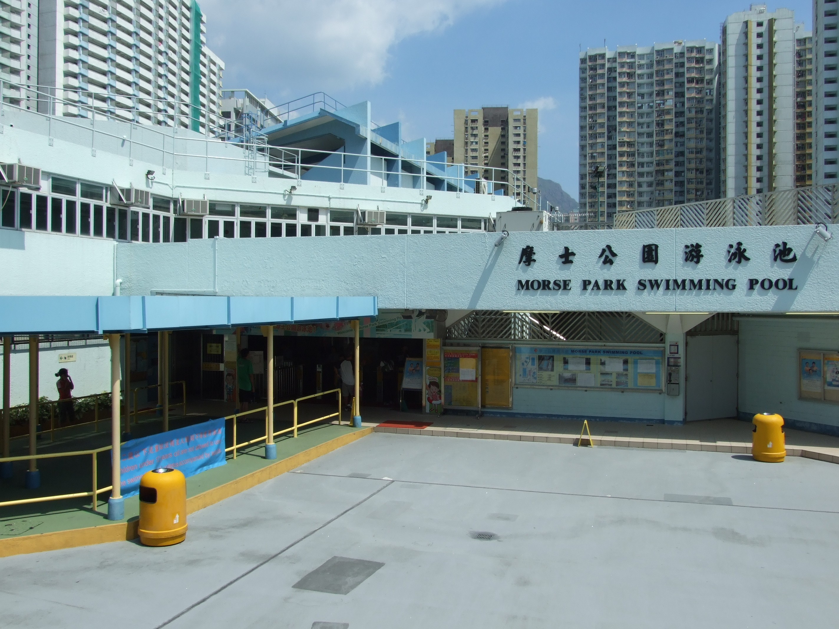 中文（香港）: 摩士公園游泳池入口